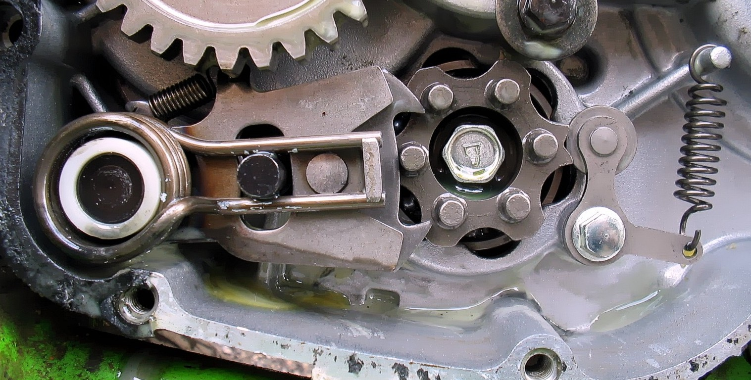 Sistema di selezione delle marce in un cambio ad innesti frontali di una Kawasaki KX